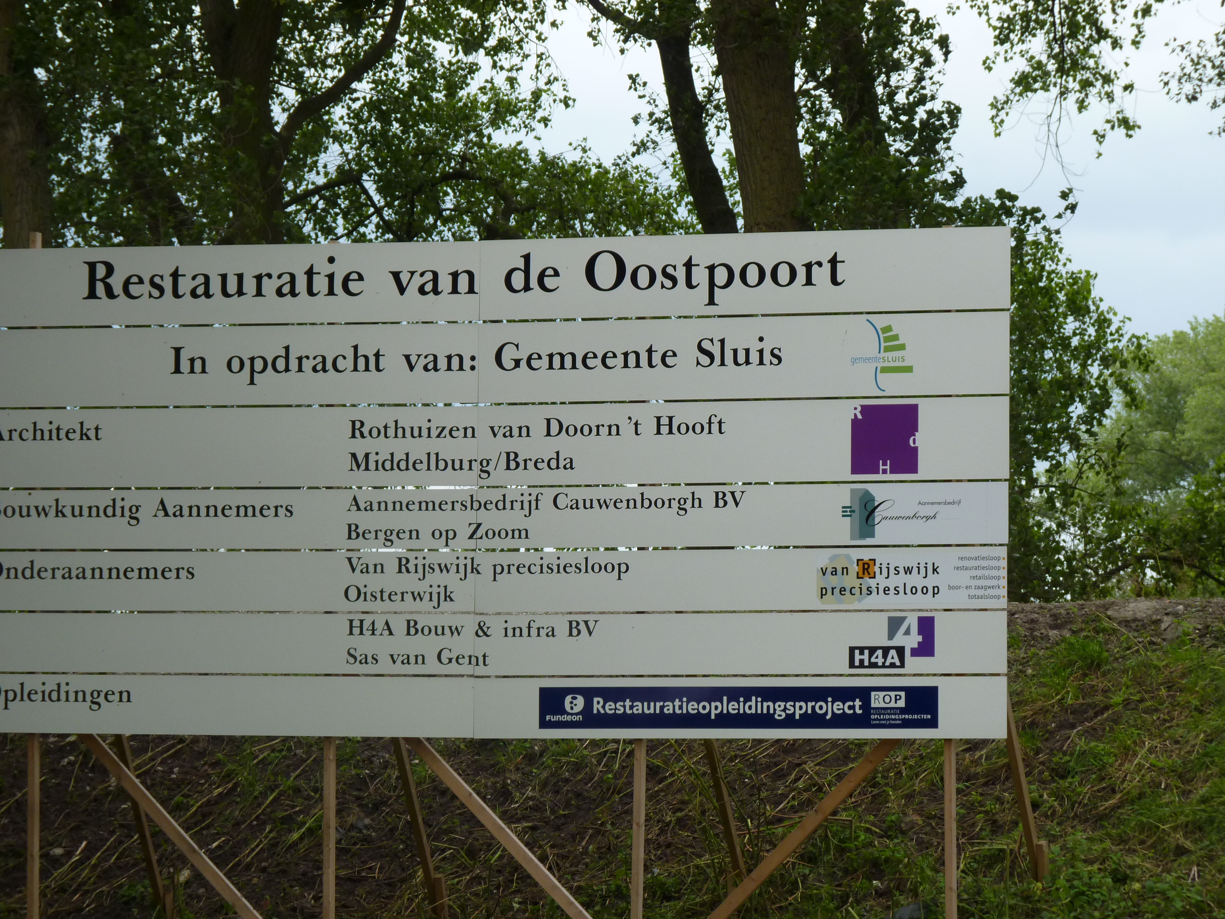 Bord restauratie Oostpoort in Sluis; de foto is genomen in de zomer van 2011, toen de restauratie quasi achter de rug was.